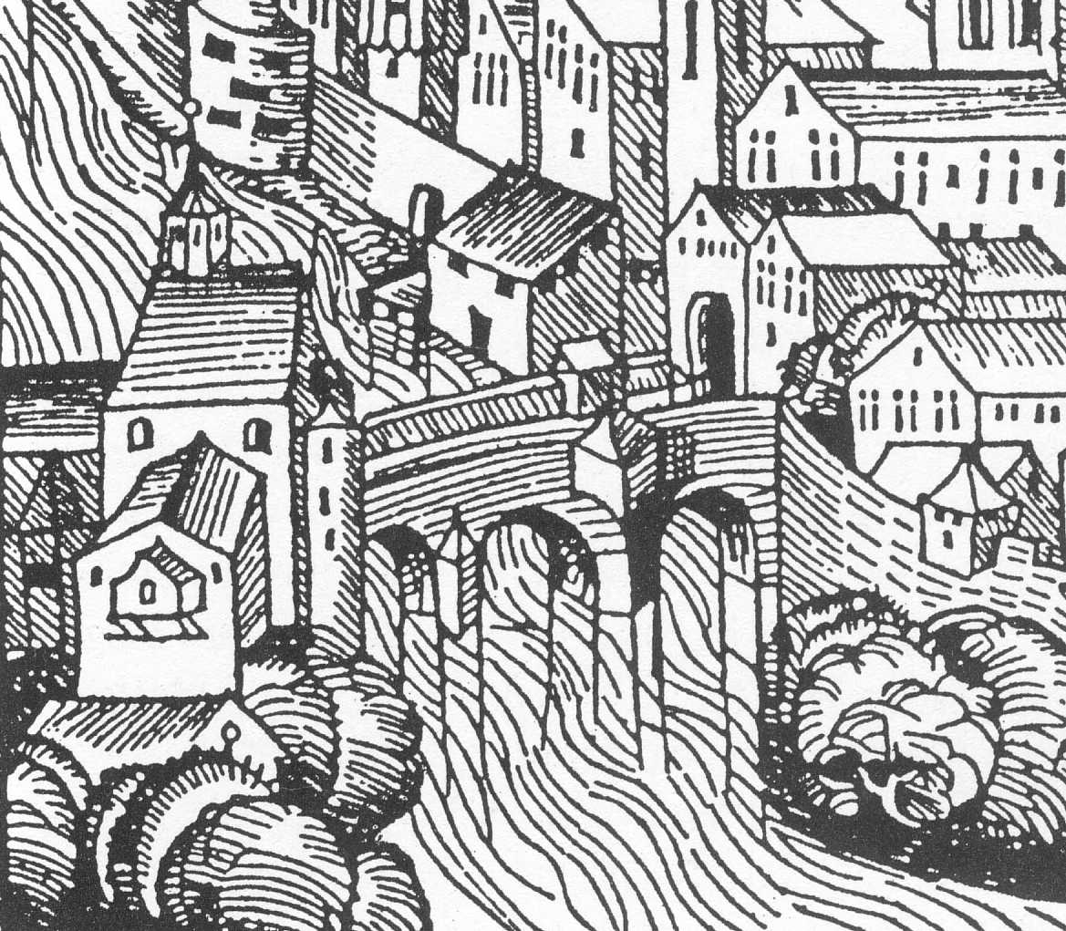 Das Heilig-Geist-Spital in Eichstätt. Ausschnitt aus einem Holzstich der Schedel'schen Weltchronik, 1493